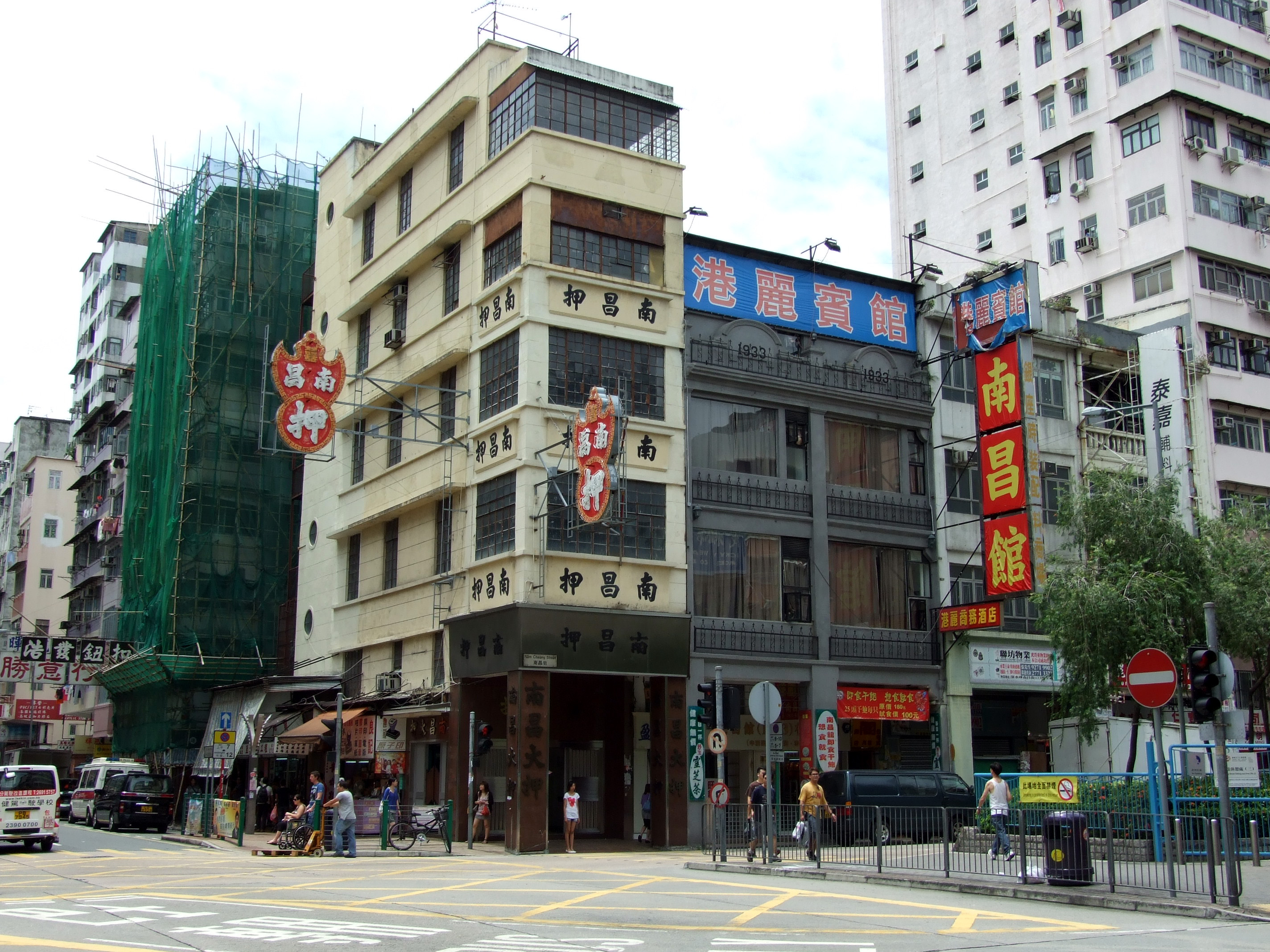 中文（香港）: 南昌押